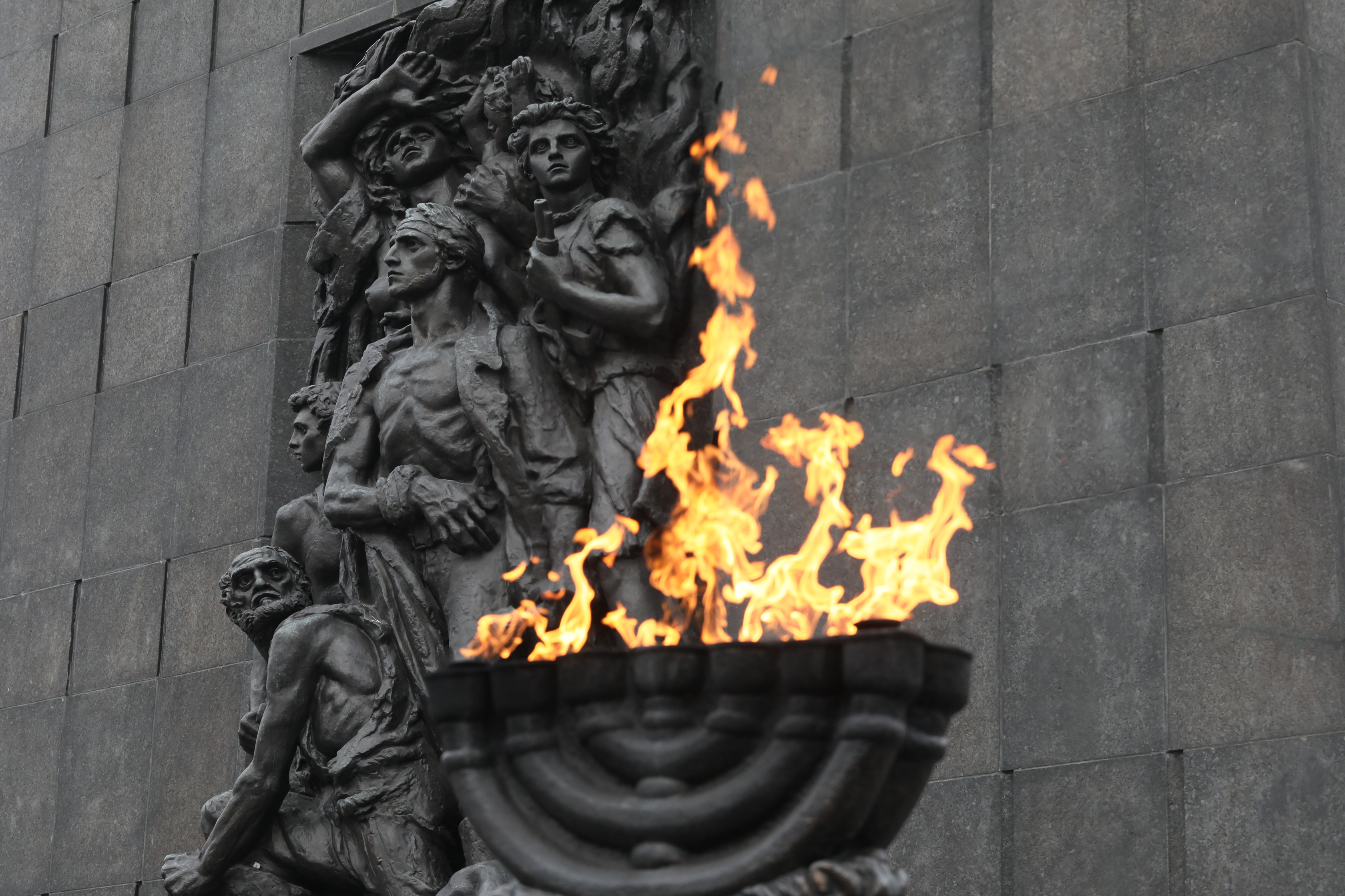 Międzynarodowy Dzień Pamięci o Ofiarach Holokaustu. Uroczystości w Warszawie z udziałem Wicemarszałków Sejmu.